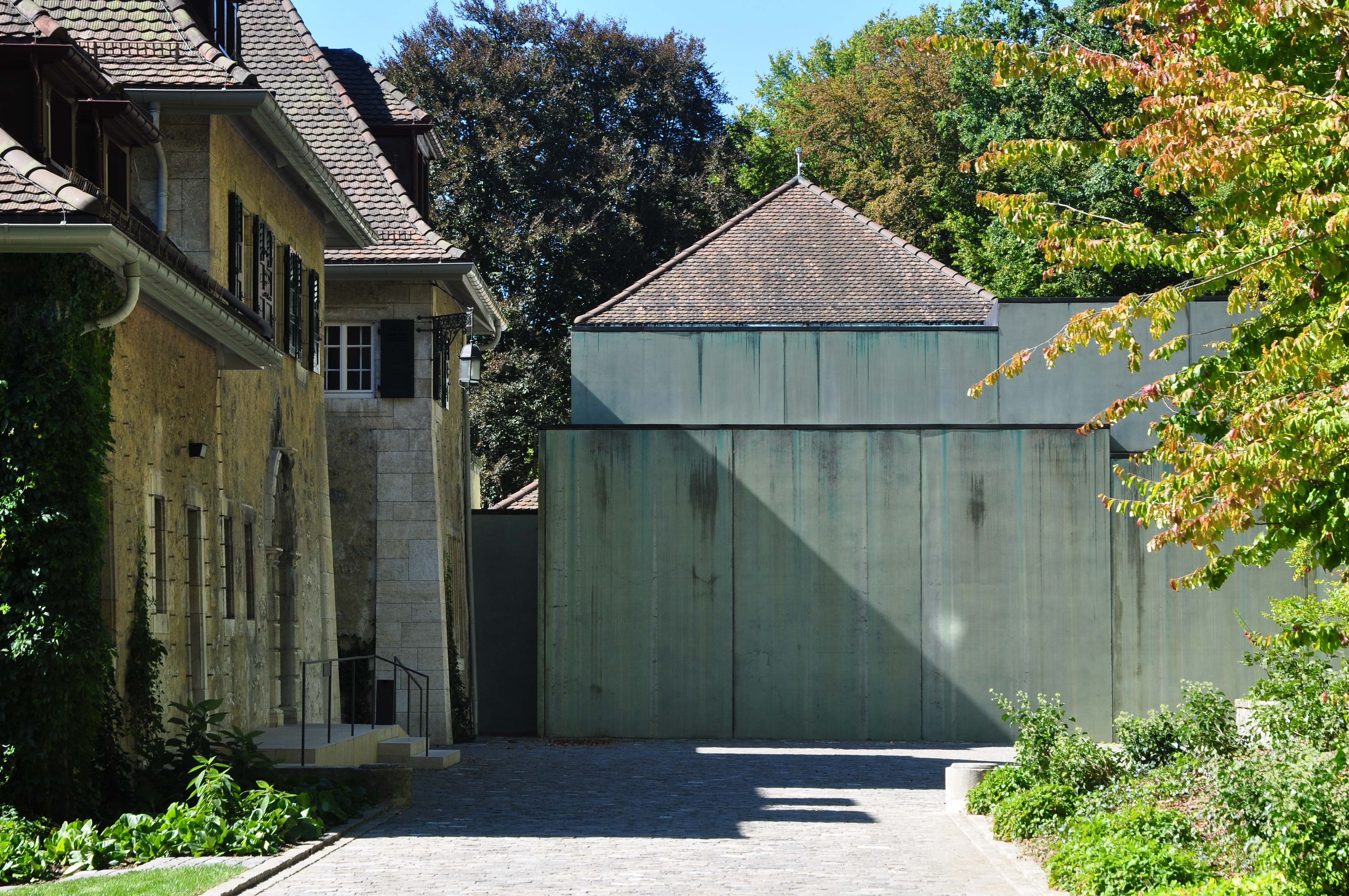 Villa Am Römerholz (ehemalige Villa Henri Sulzer-Ziegler) und Sammlung Oskar Reinhart «Am Römerholz», Haldenstrasse 95 in Winterthur (Switzerland)